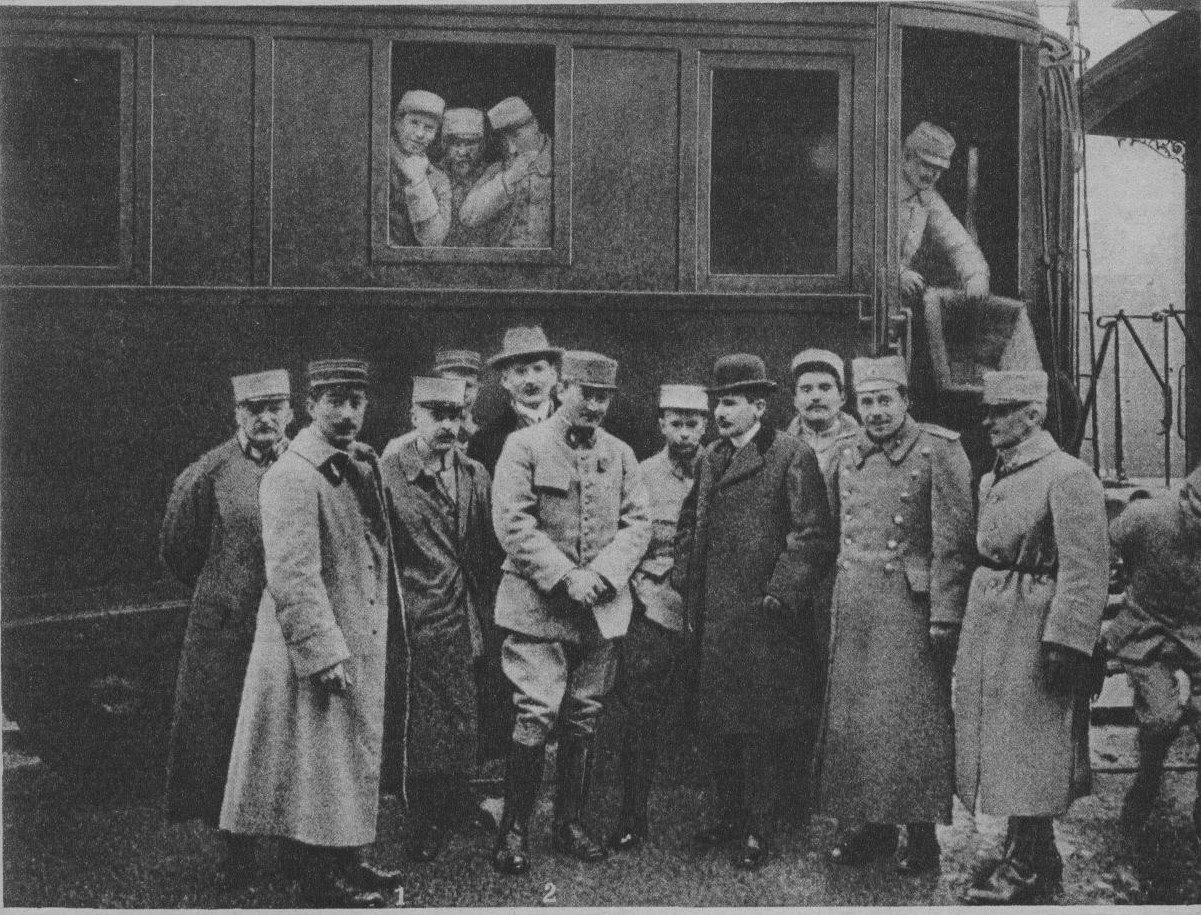 Les aviateurs français Louis Pauhlan et Martinet aux service de la Serbie en 1915 à Nish.